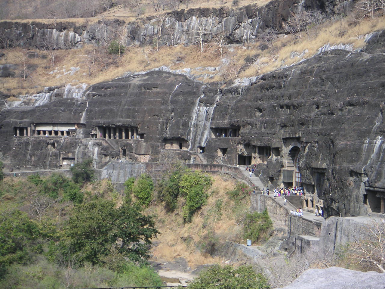 Ajanta caves, Maharashtra